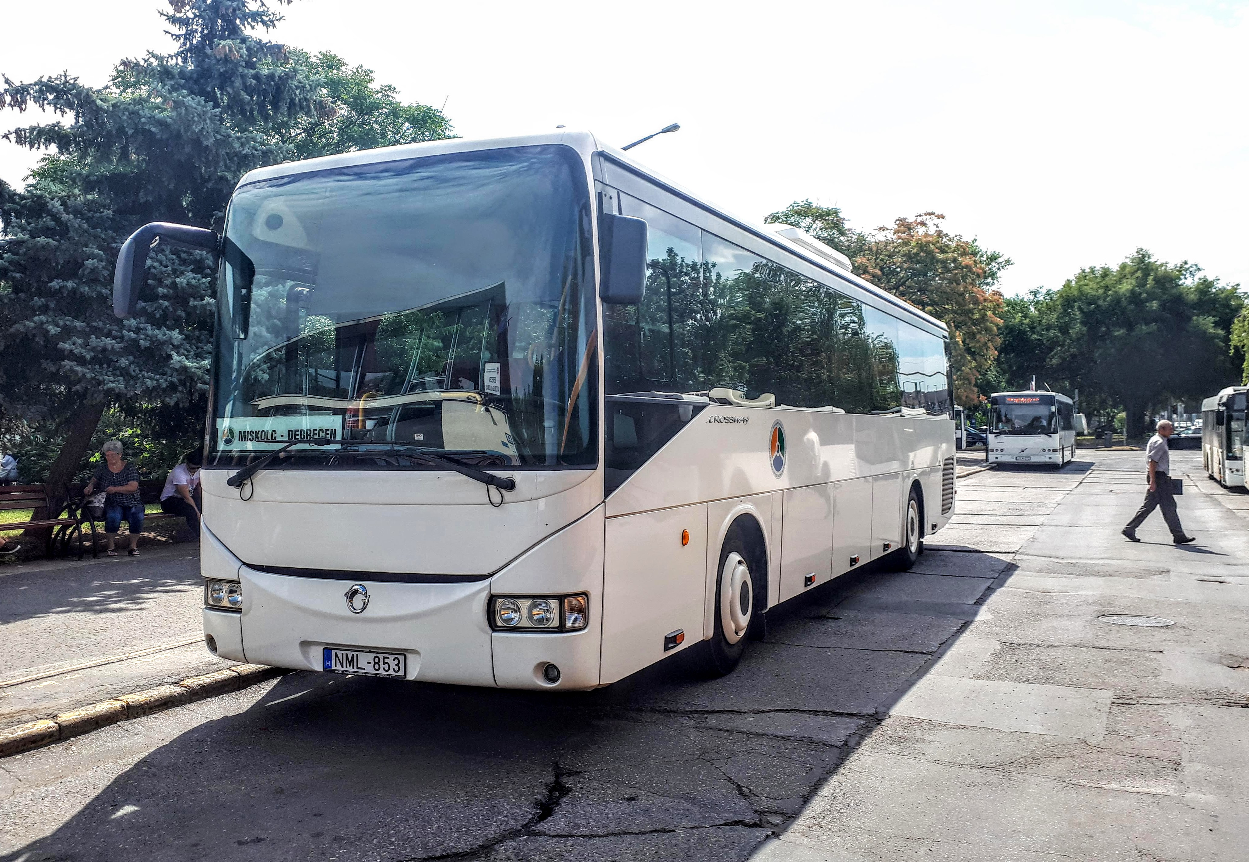 Az ÉMKK NML-853 rendszámú Irisbus Crossway 12M típusú busza Debrecenben, a 1372-es távolsági járaton.